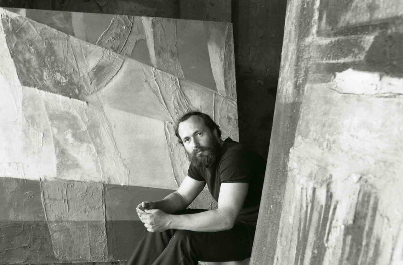 Servizio fotografico : Bologna, 1974 / Paolo Monti. - Strisce: 5, Fotogrammi complessivi: 29 : Negativo b/n, gelatina bromuro d'argento/ pellicola ; 35 mm. - ((Sul portanegativi: N[I]K[MA]T FP4. - Fonte: Agenda di Paolo Monti: Leica 1501-3000 Controllo numerazione (1950-1978), presso Archivio Paolo Monti